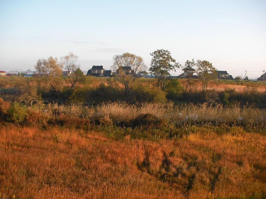 登米市と涌谷町の境を流れる旧迫川